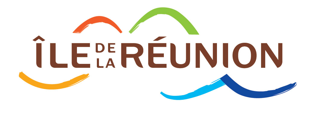 Logo de la destination "Ile de La Réunion"